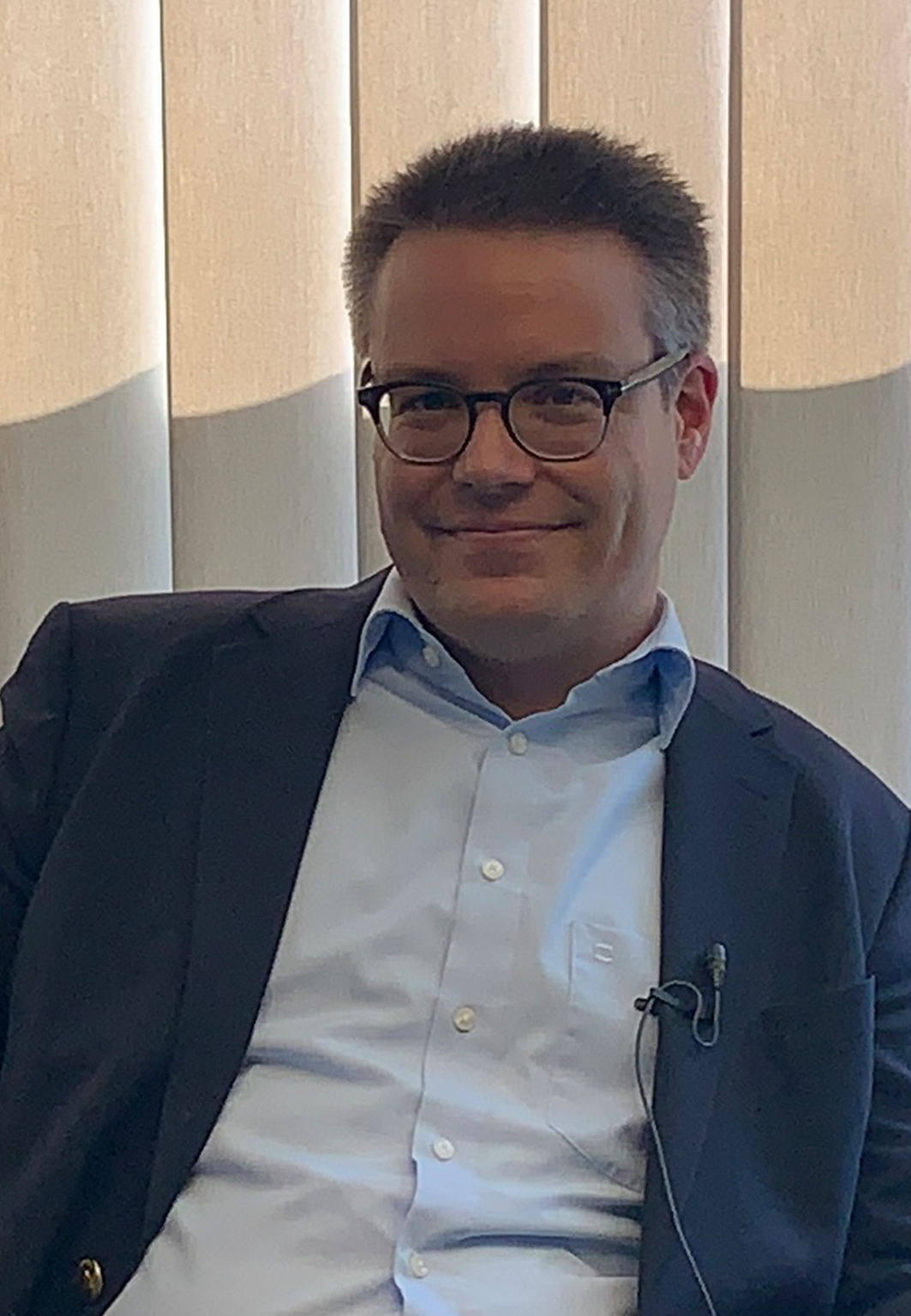 Tobias Lindner im Interview mit dem Podcast zur Berateraffäre